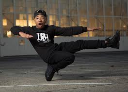 Kiswahili: Huyu ni kida